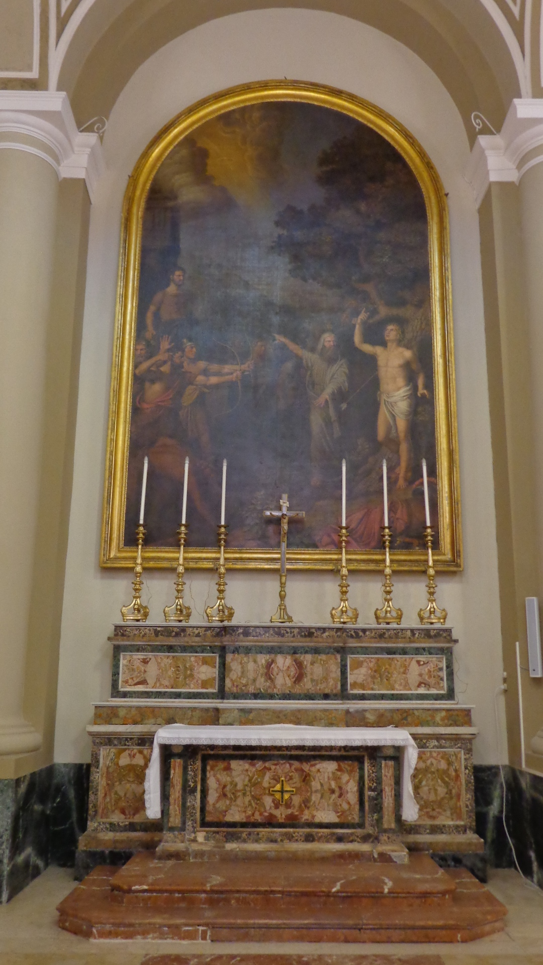 Altare San Sebastiano navata sinistra, Pietro Paolo Vasta, attribuzione, Martirio di San Sebastiano